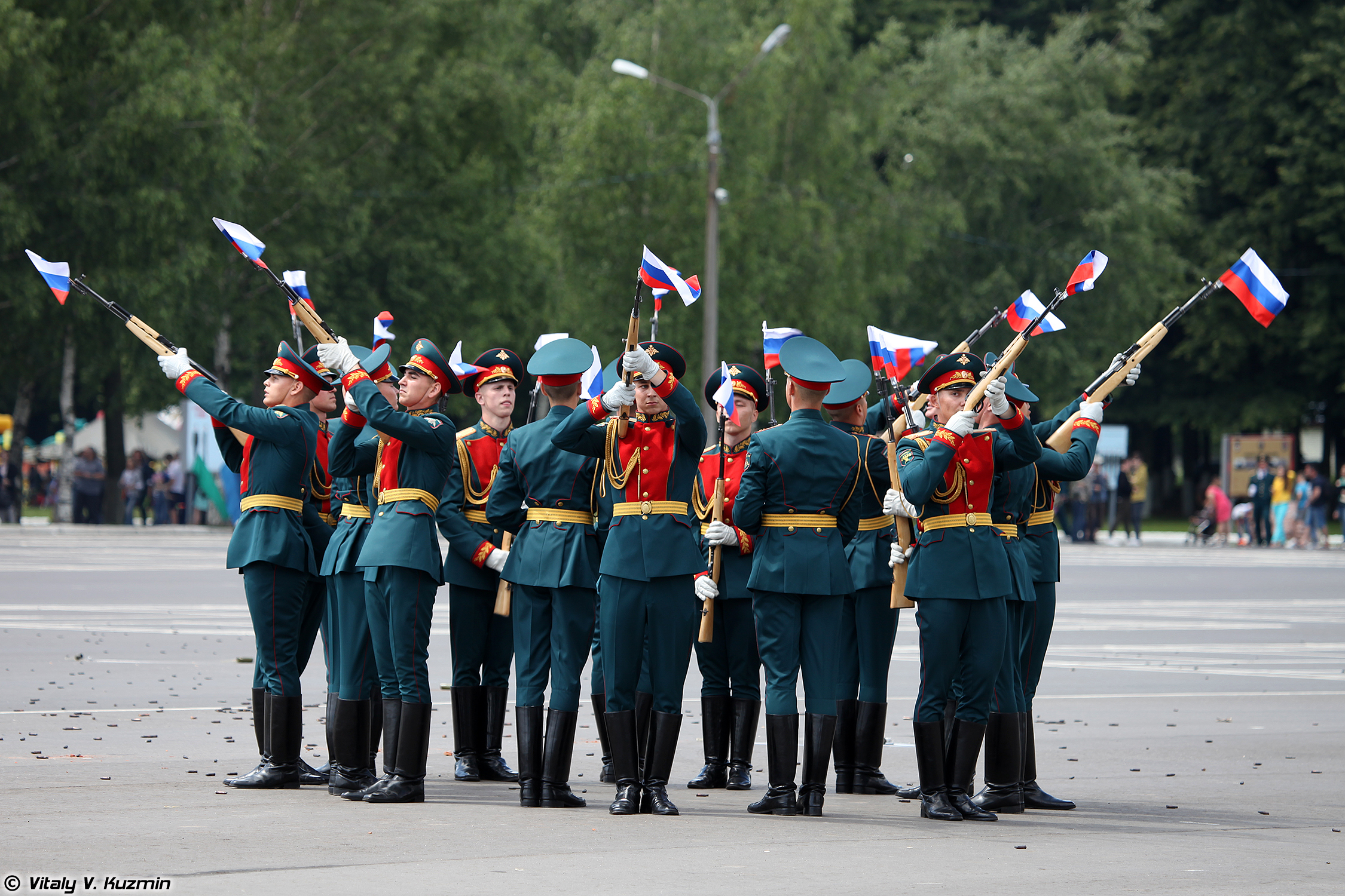 Выступление роты почётного караула 154-го отдельного комендантского Преображенского полка (154th Separate Preobrazhensky Commandant Regiment Honour Guards show)